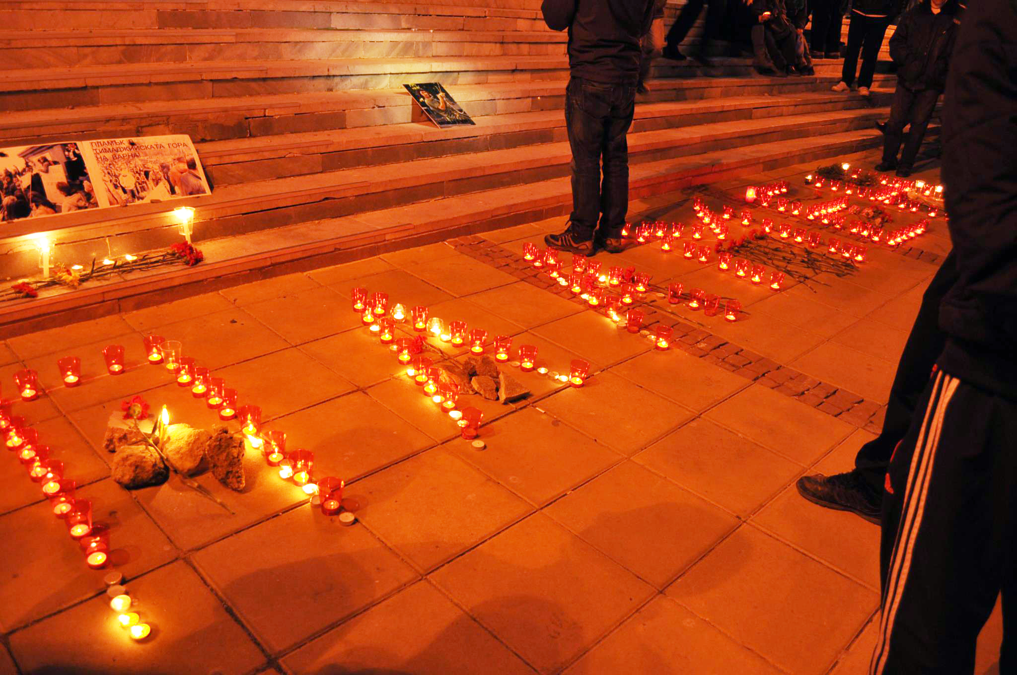 Протестиращите във Варна изписват на 4.3.2013 г. със запалени свещи името на Пламен Горанов точно на мястото, където се самозапали пред стълбите на община Варна на 20 февруари.